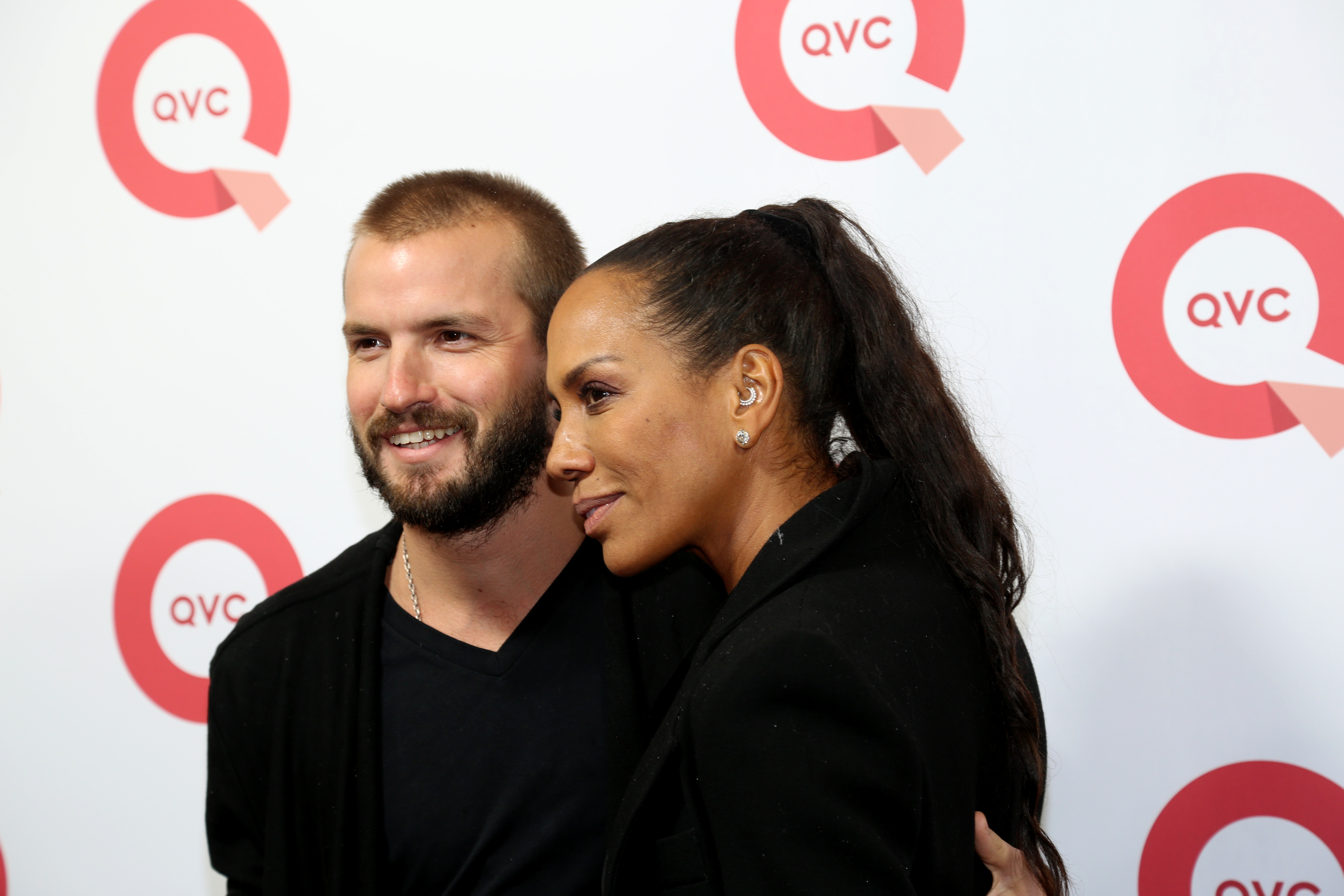 Barbara Becker mit Juan Lopez Salaberry beim QVC Fashion-Event zur "VOGUE Fashion's Night Out", am 08.09.2017 in Düsseldorf.